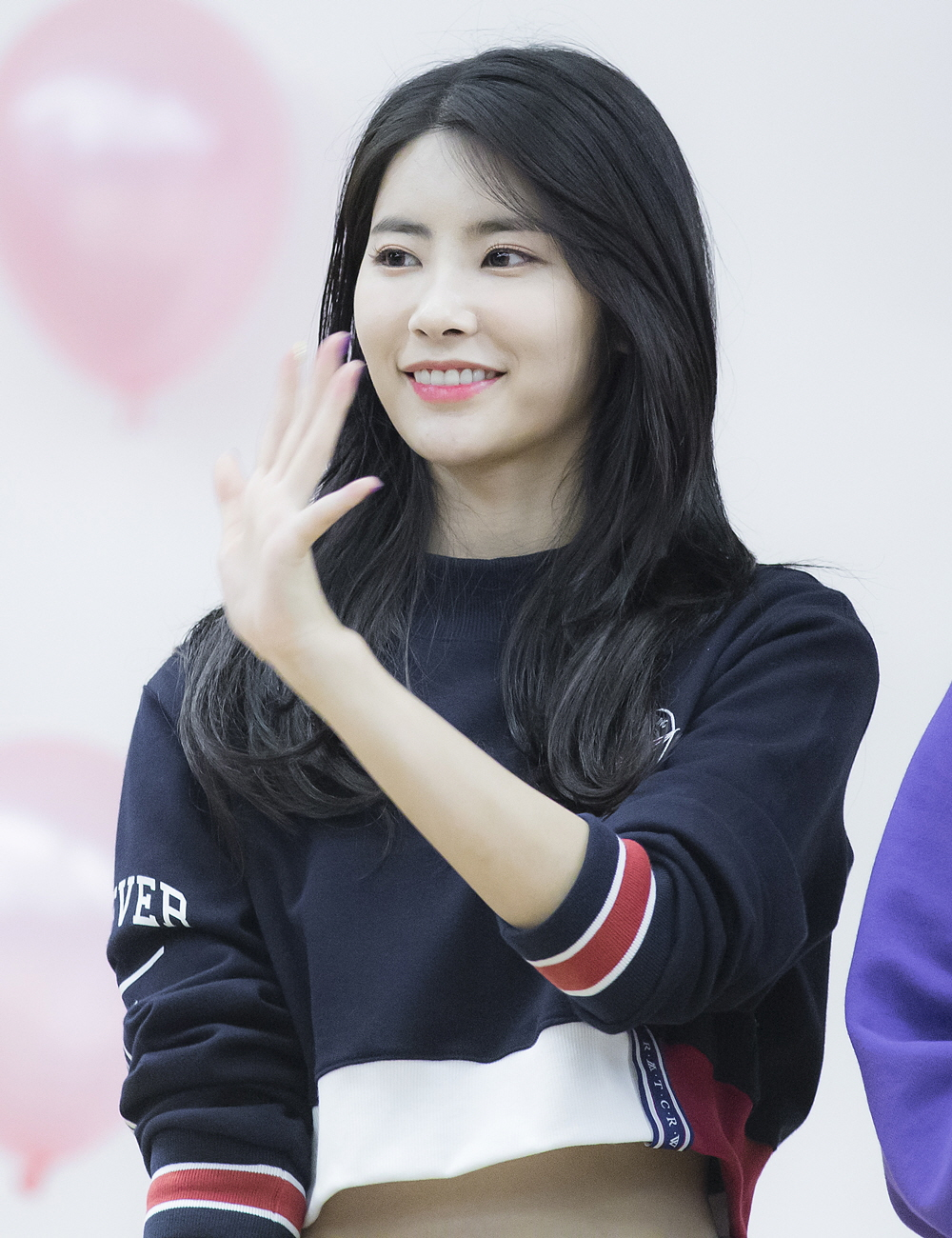 170914 다이아 2주년